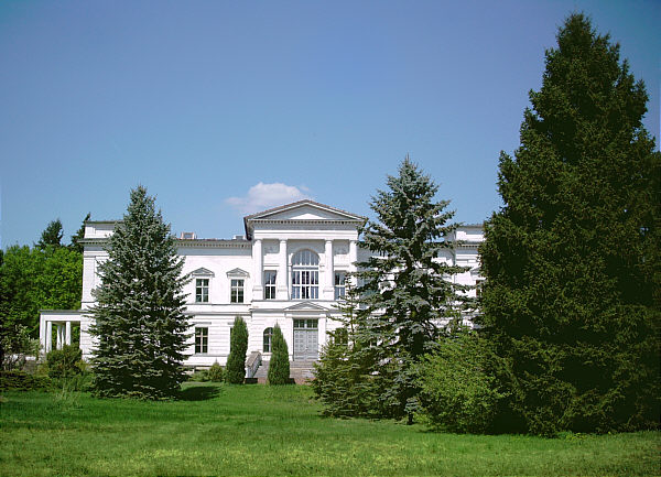 Sommerswalde bei Schwante (Oberkrämer)